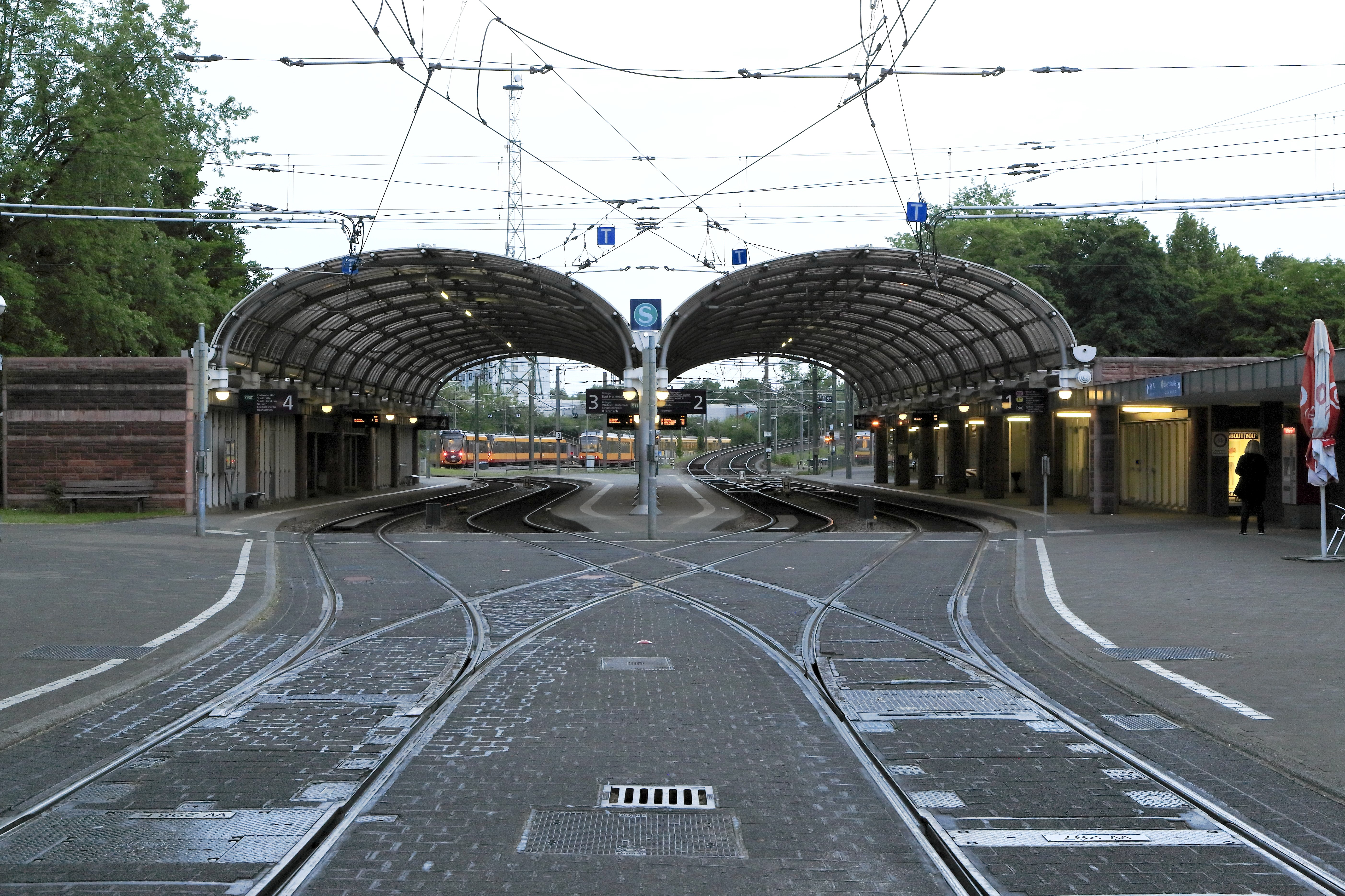 Die Bahnsteighallen des Albtalbahnhofes vom Gleisdreieck Ebertstraße, das die Verbindung in das Straßenbahnnetz herstellt. In den Bahnsteighallen besteht in der Regel Linienbetrieb, die Gleise 3 und 4 in der linken Halle werden von den Zügen der Albtalbahn Richtung Ettlingen Stadt, Bad Herrenalb und Ittersbach benutzt, die Gleise 1 und 2 in der rechten für die vom und zum Fernbahnnetz Richtung Rastatt und Wörth. Zusätzlich besteht ganz rechts eine Straßenbahnwendeschleife durch die Maria-Alexandra- und Karlstraße. Die Gleis- und Weichenmaße entsprechen im gesamten Albtalbahnhof Straßenbahnnormen.